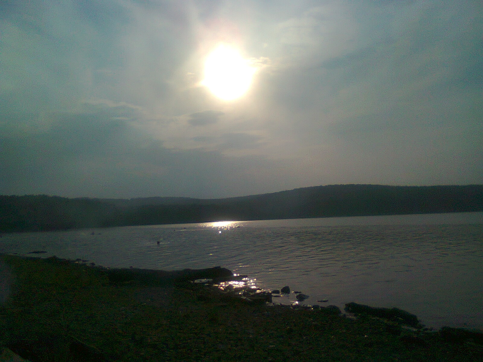 Озеро Синара2